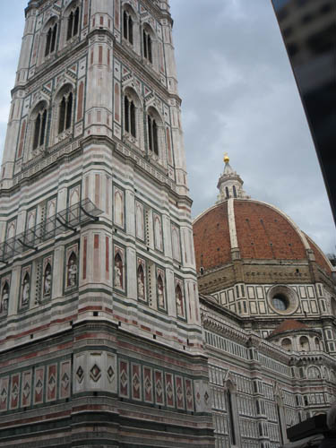 Санта-Мария-дель-Фьоре и кампанила Джотто, Флоренция